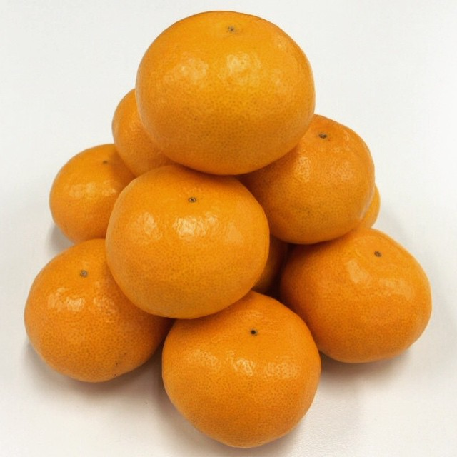 高知県の特産品、山北みかん。